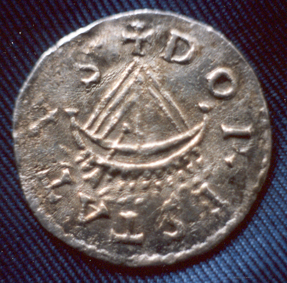 Karolingische Dorestad-munt uit 814. type: jpg